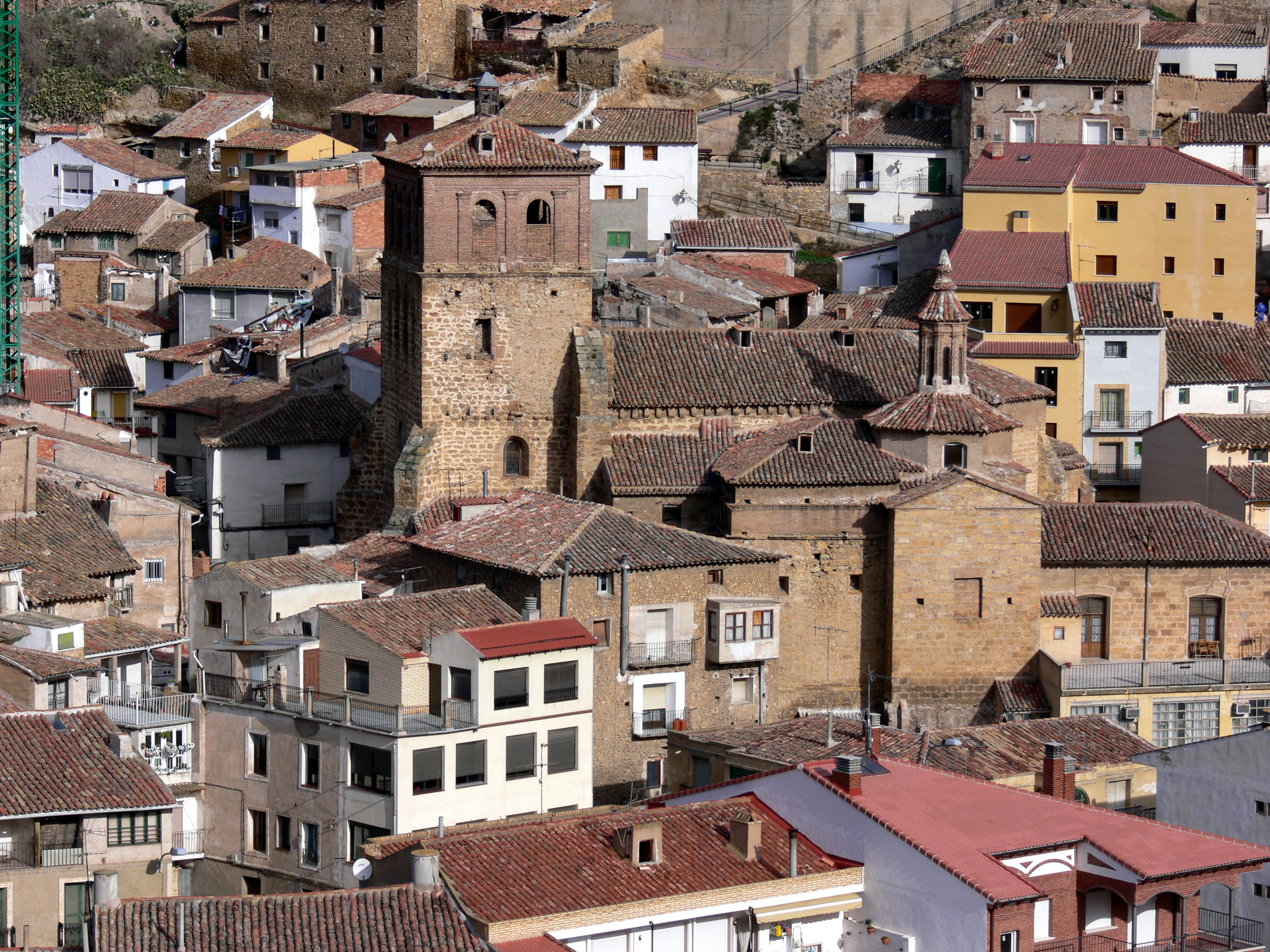 Iglesia de San Gil en Cervera del Río Alhama, La Rioja - España.